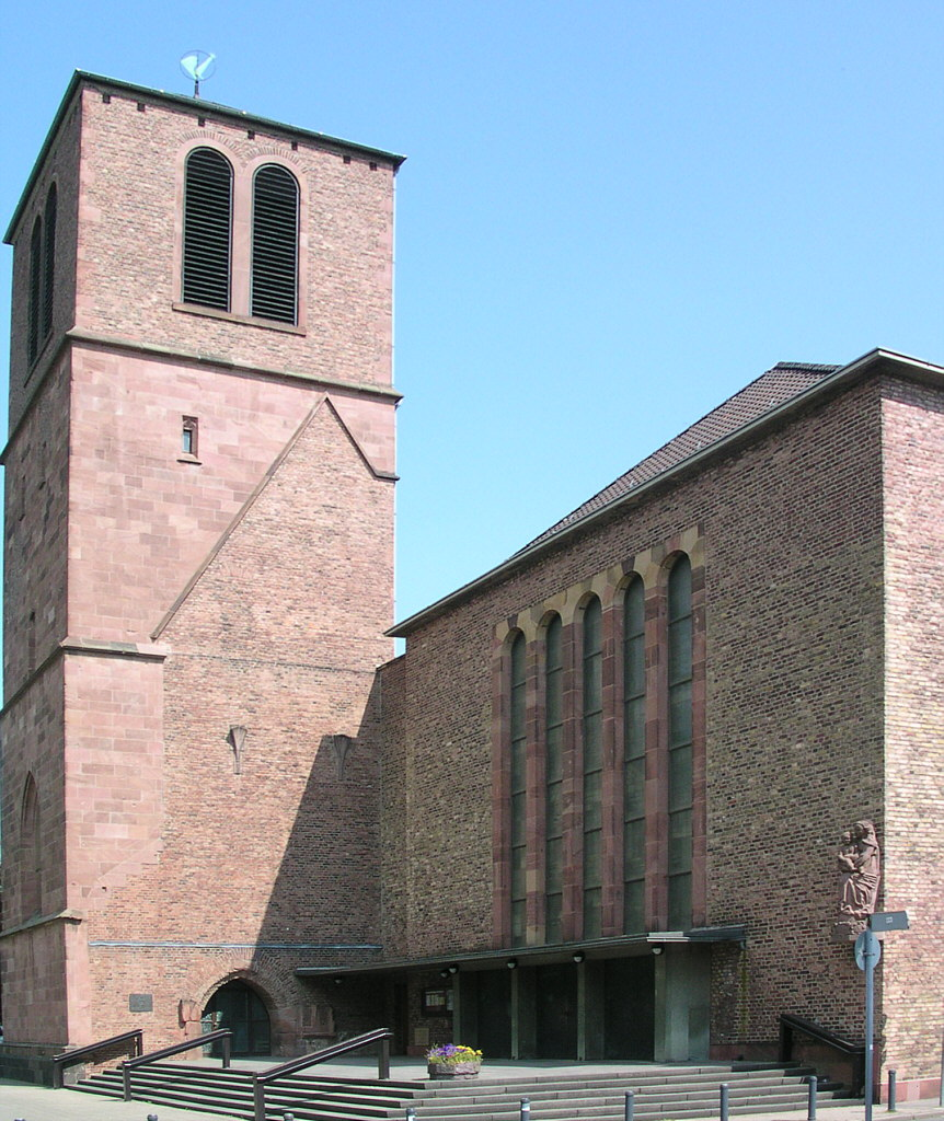 katholische Pfarrkirche St. Maria in Düren